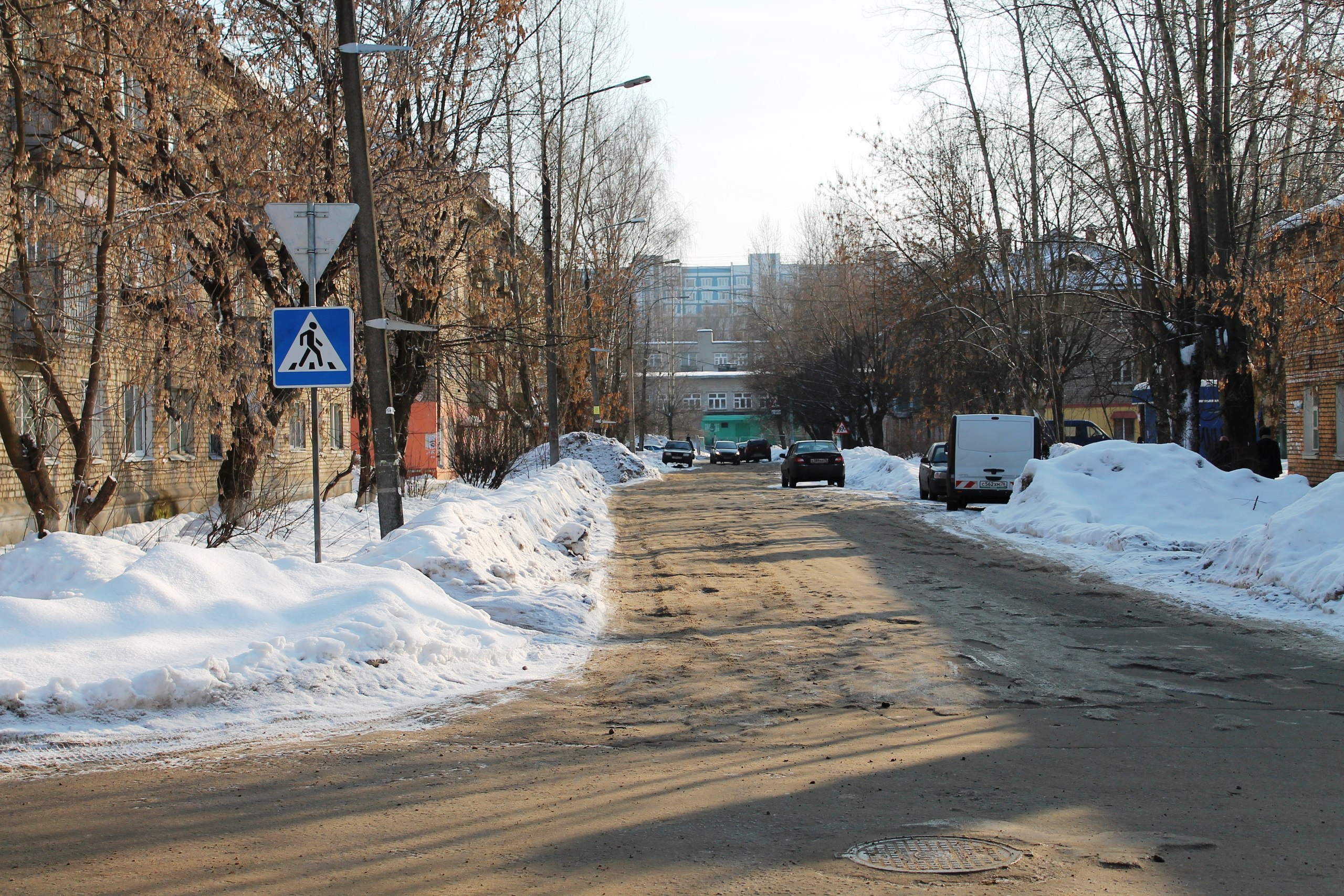 Балтийская улица, перекресток со Спортивной